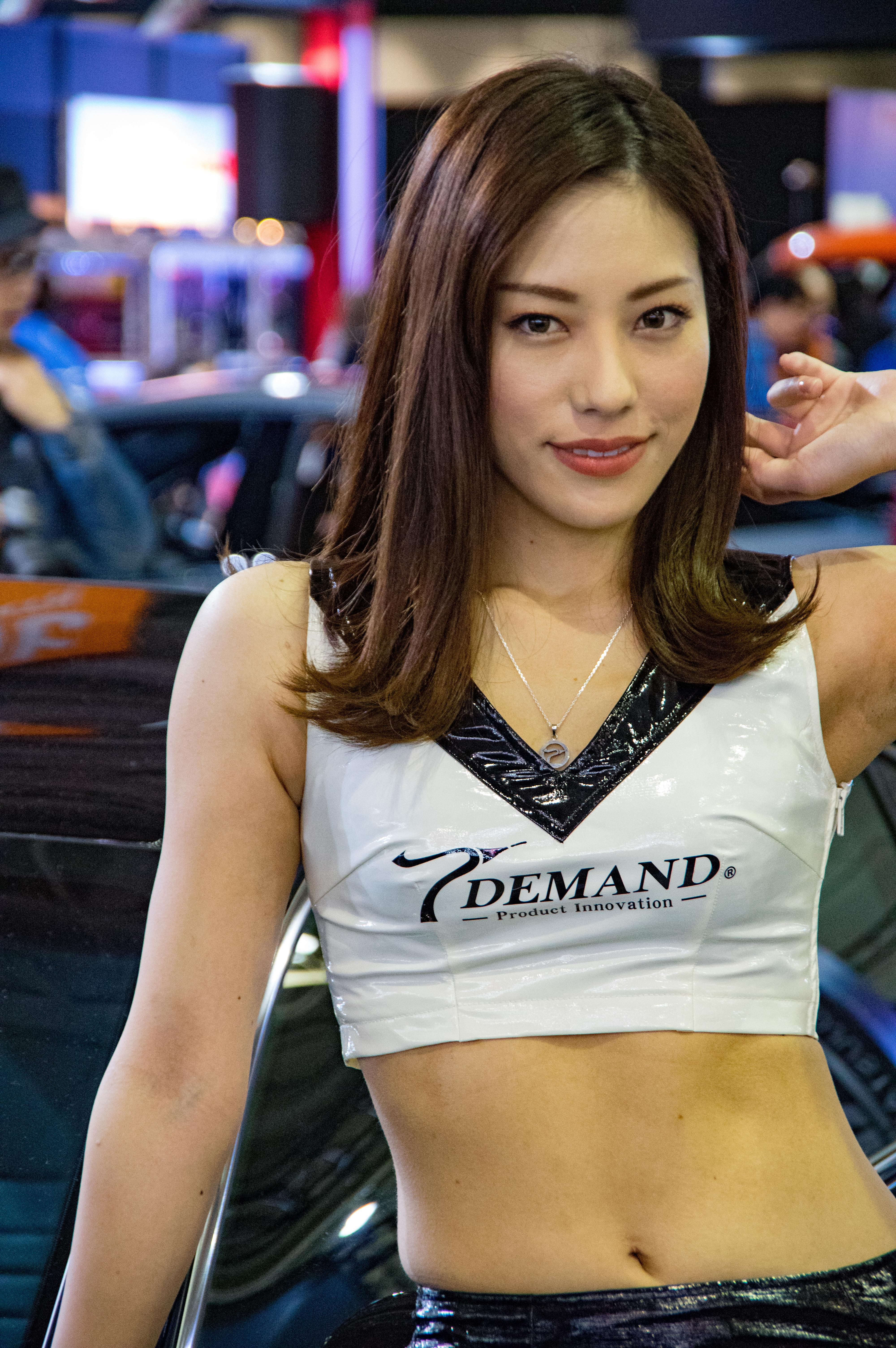 TOKYO AUTO SALON 2017 （東京オートサロン2017）-269.jpg